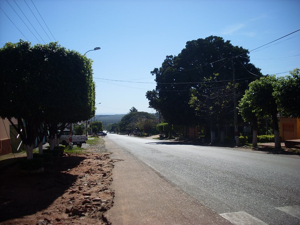 Calle Pedro Melo de Portugal